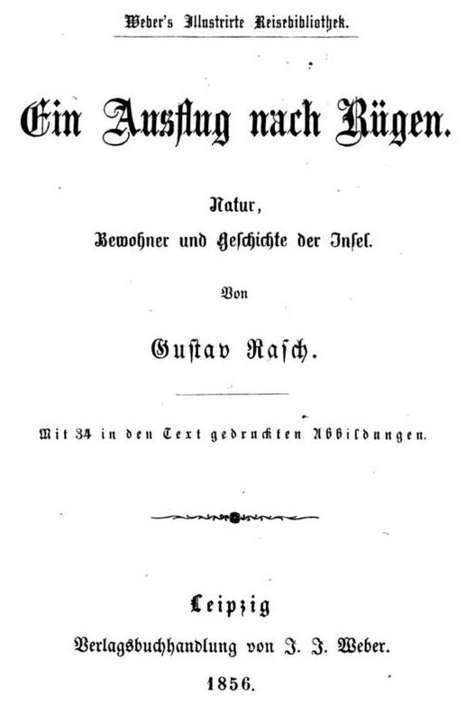 Gustav Rasch: "Ein Ausflug nach Rügen", 1856, Erstausgabe, Titelblatt